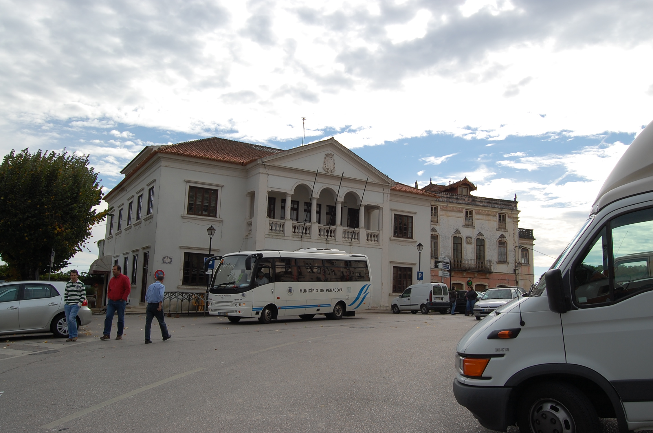 Câmara municipal de Penacova.